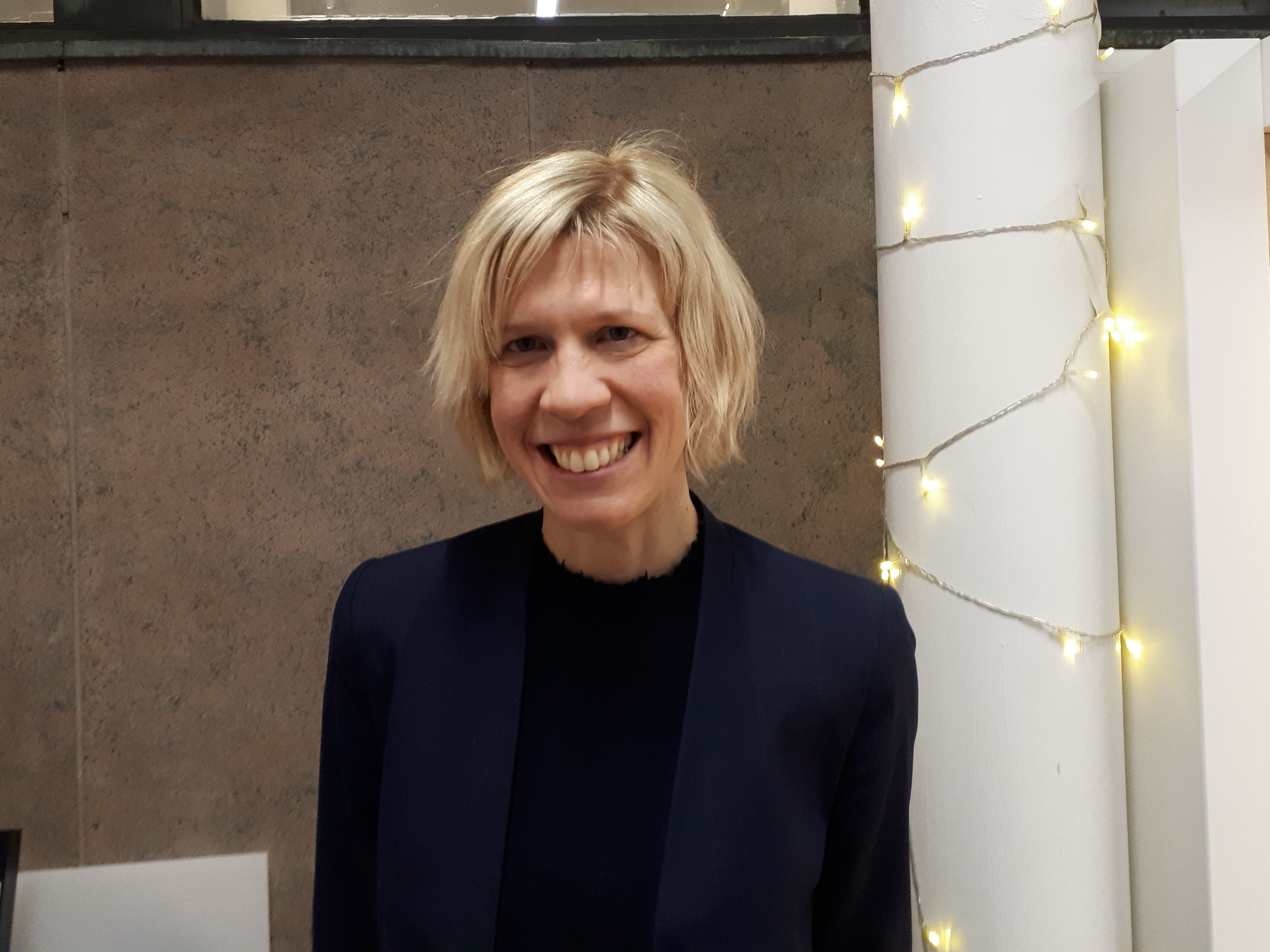 Riksdagsledamoten Maria Nilsson (L) efter en debatt på Stadsbiblioteket i Göteborg måndag den 4:e februari 2019.